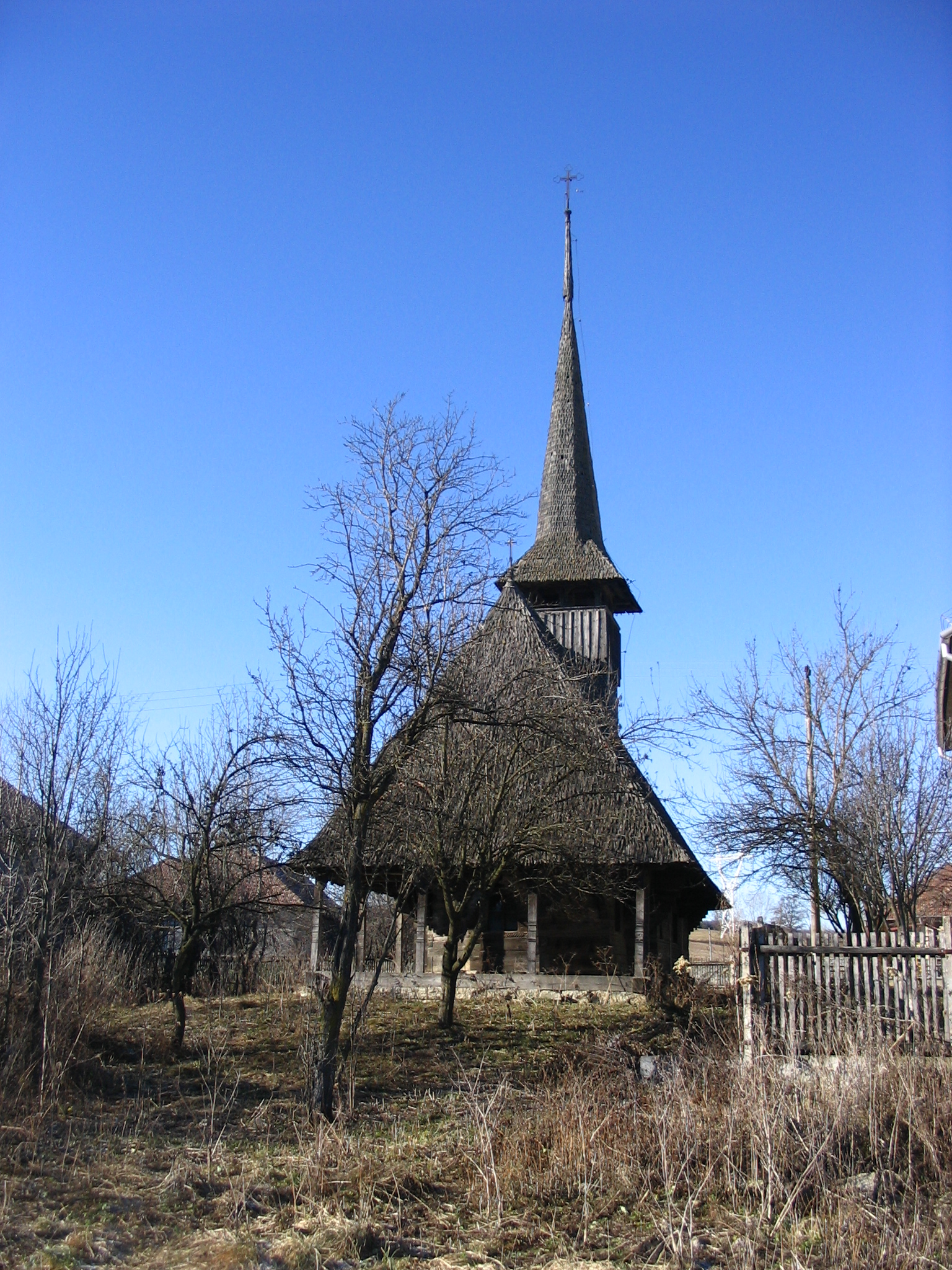 Biserica de lemn din Buzaş